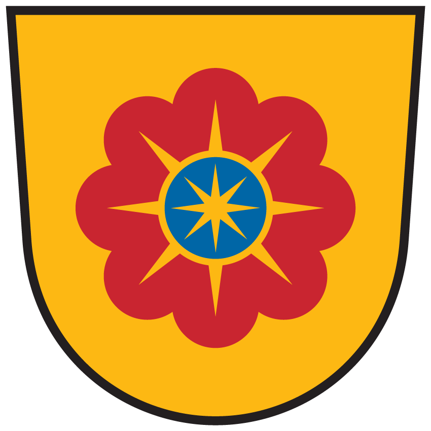 Wappen von Strassburg